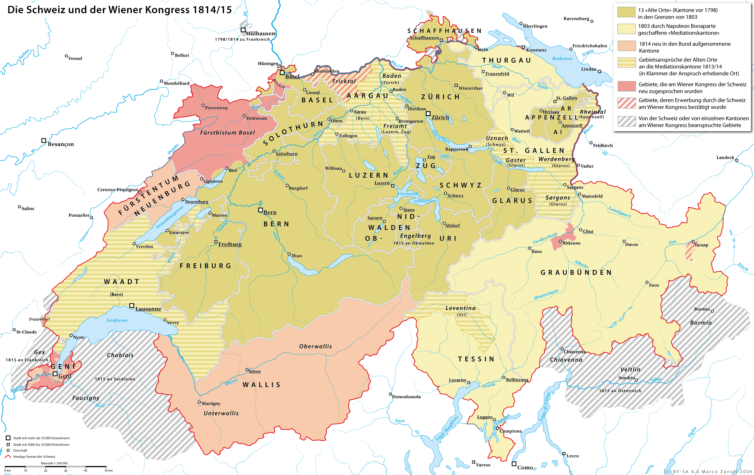 Die Schweizerische Eidgenossenschaft am Wiener Kongress 1814/15